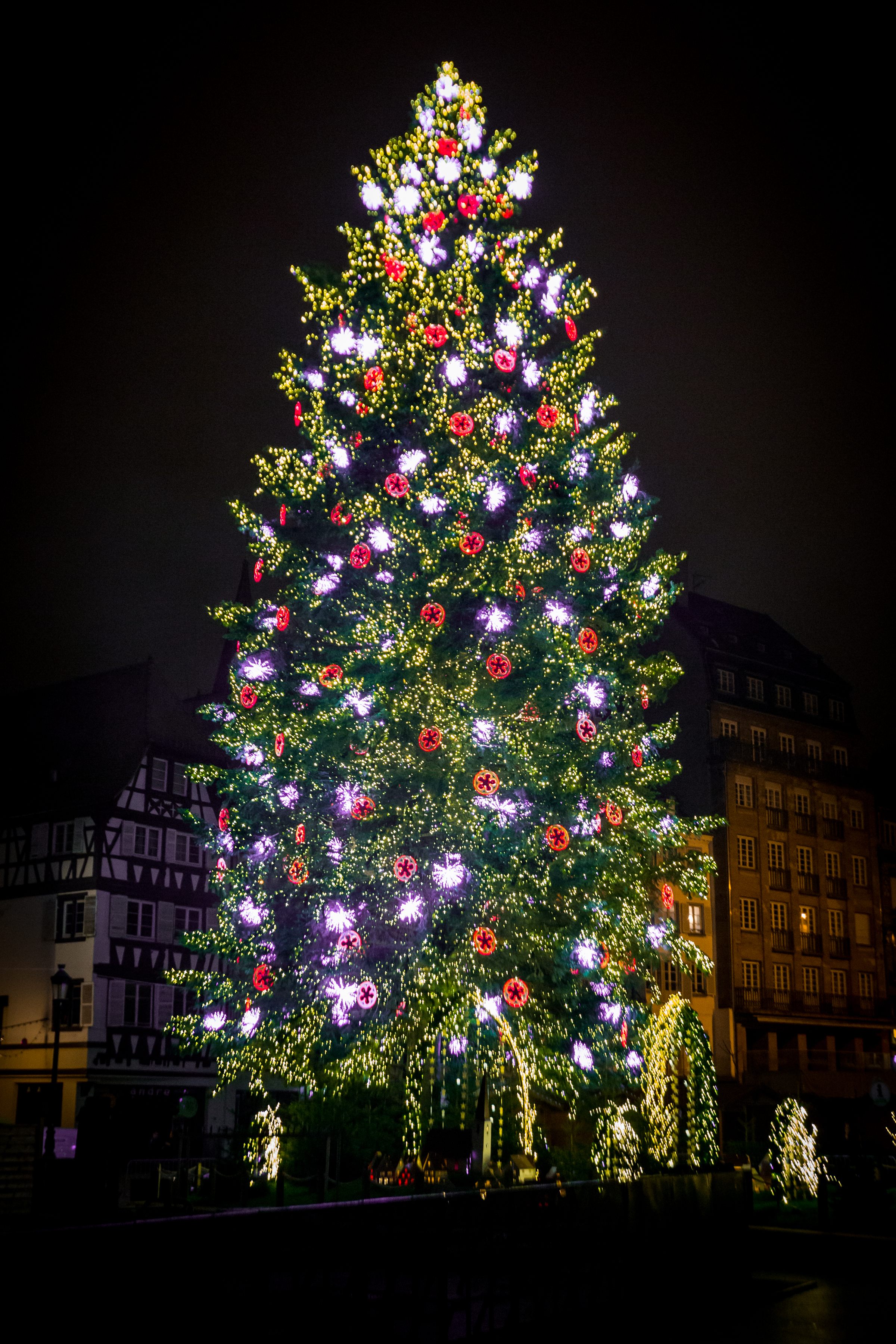 Strasbourg capitale de Noël, le grand sapin version 2014